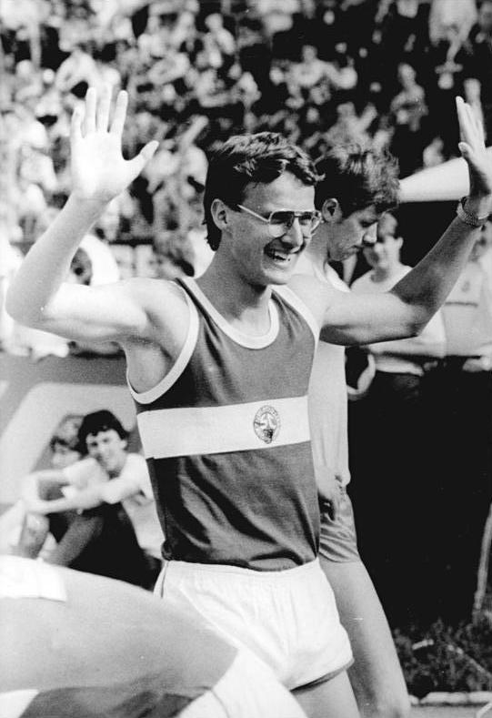 Thomas Schönlebe ADN-ZB Kluge 2.6.84 Erfurt: 35. DDR-Meisterschaften in der Leichtathletik - Junioren-Europarekord- Im 400 m Lauf der Männer wurde Thomas Schönlebe vom SC Karl-Marx-Stadt mit dem Junioren-Europarekord von 45,13 DDR-Meister.